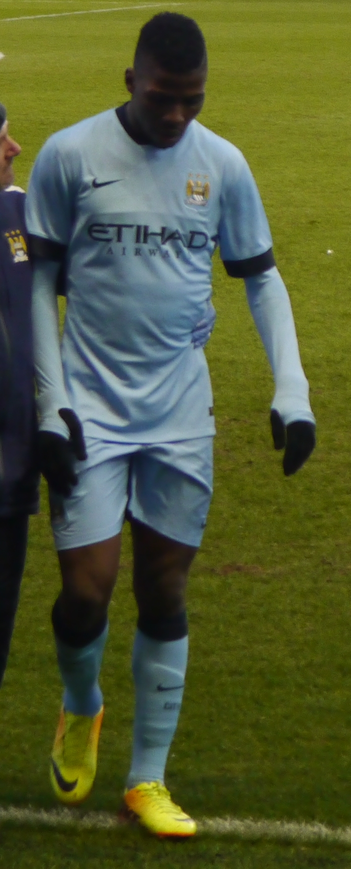 Kelechi Iheanacho avec Manchester City le 24 février 2015